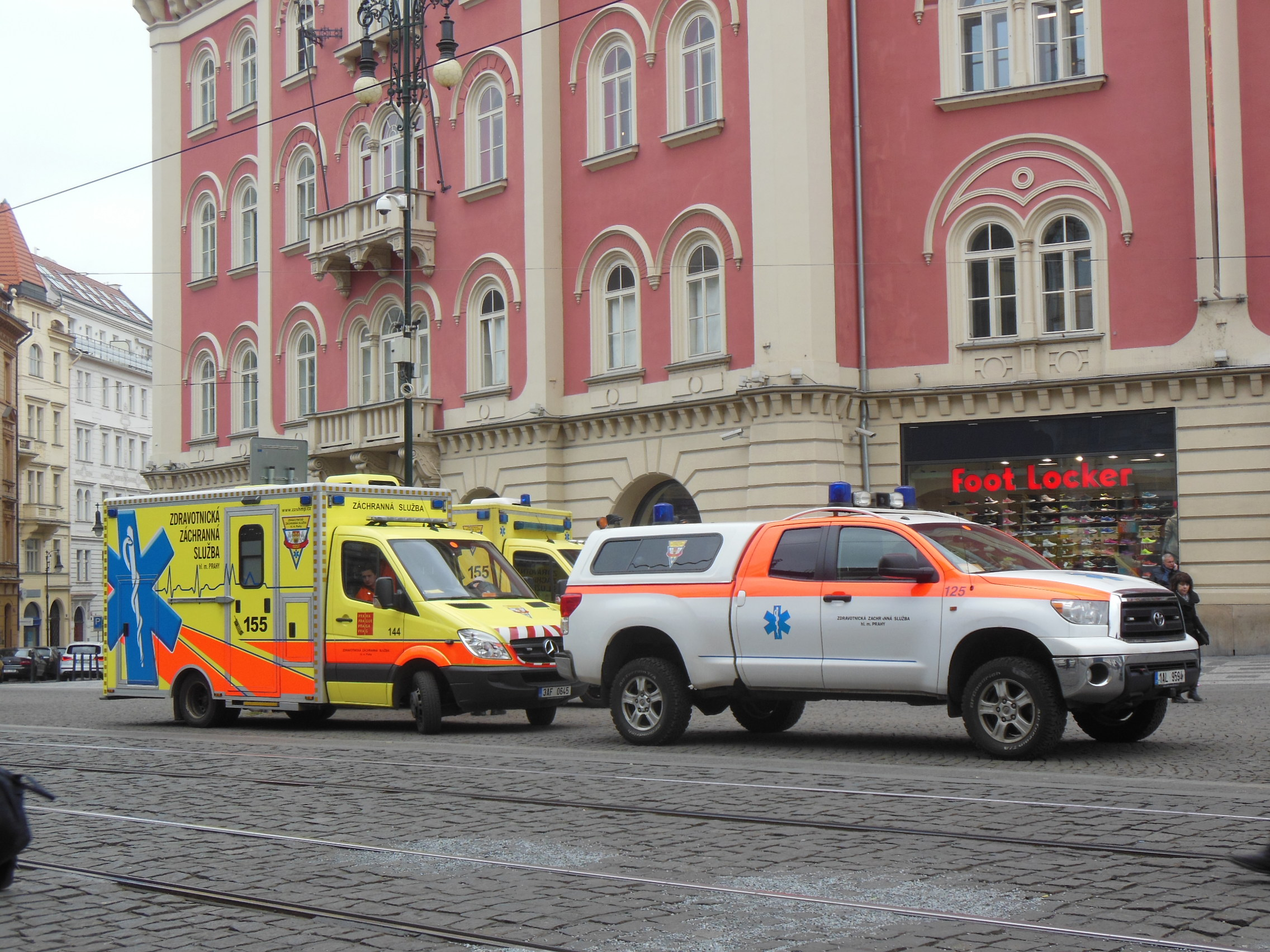 Praha-Nové Město. Vozy Zdravotnické záchranné služby hl. m. Prahy na náměstí Republiky.